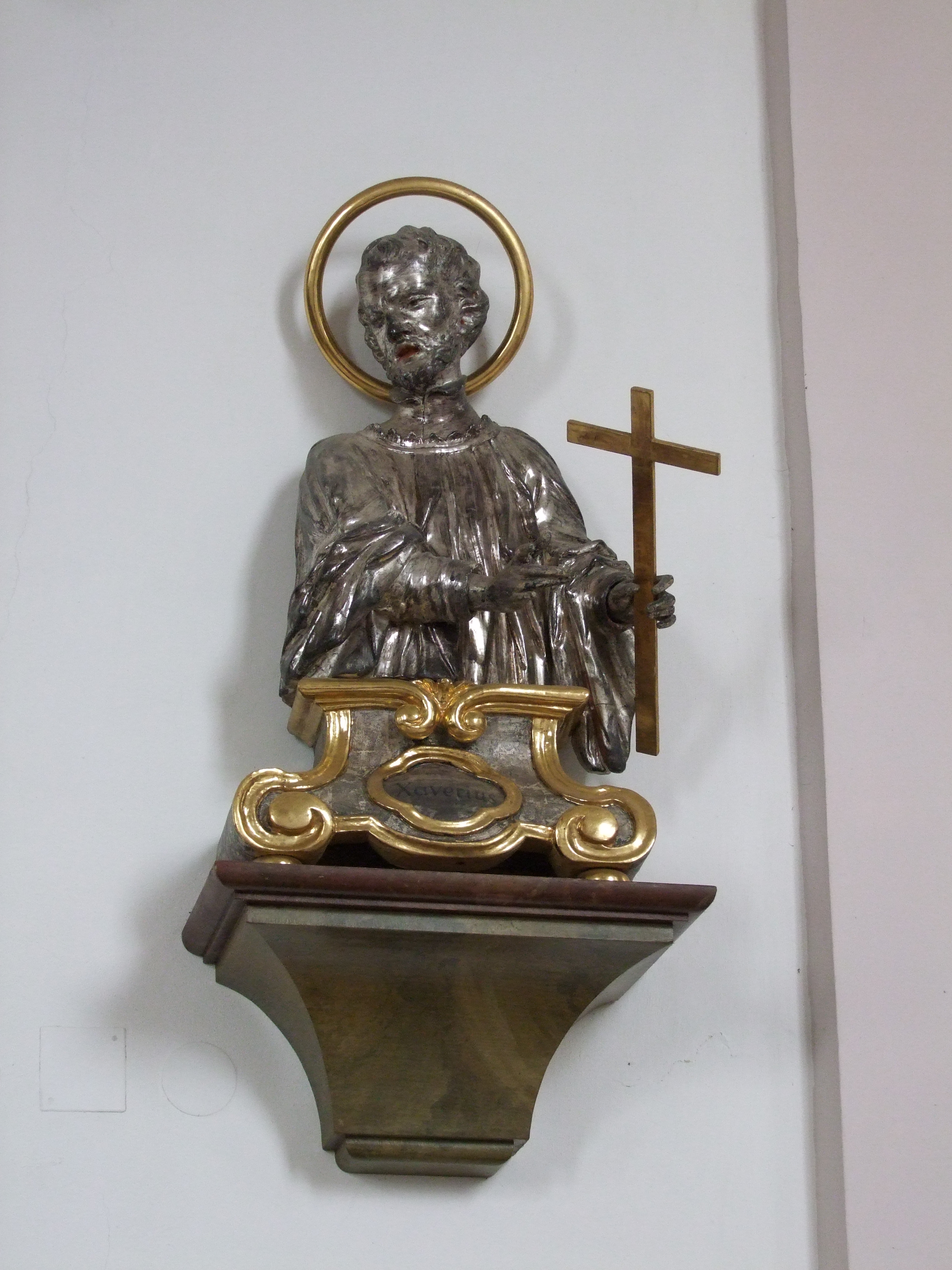 St. Jakobus der Ältere im oberschwäbischen Mindelau, einem Ortsteil der Stadt Mindelheim in Bayern/Schwaben